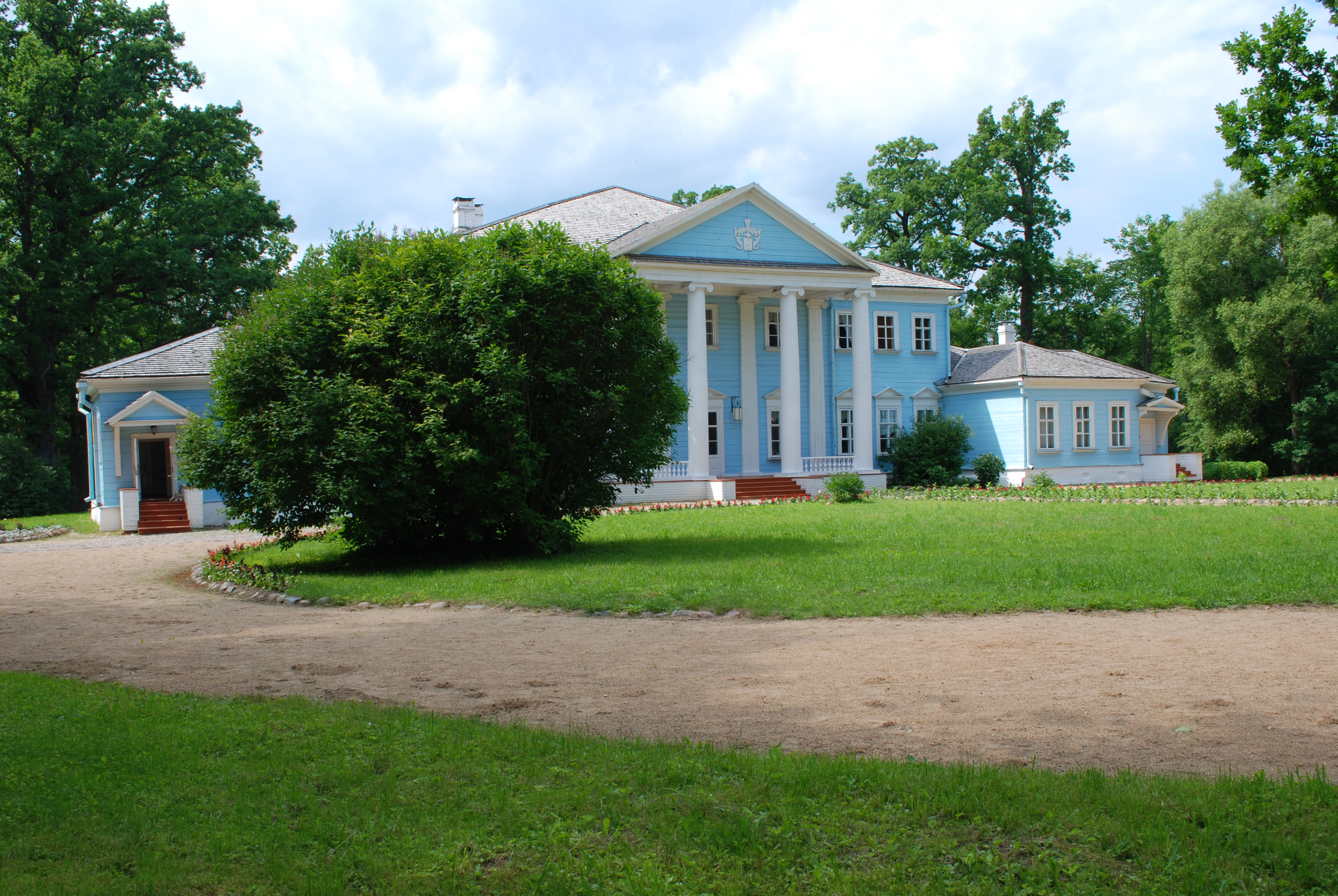 Усадьба «Новоспасское» (Смоленская область, Ельня, село Новоспасское)